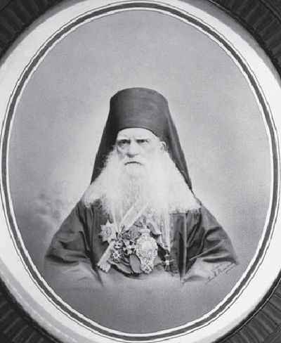 Епископ Порфирий (Успенский). 1880-е годы